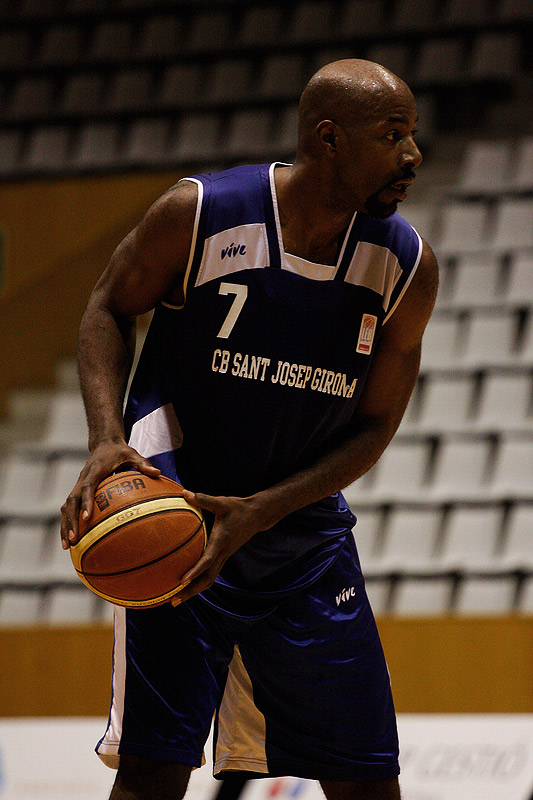 Jugador del CB Sant Josep de Girona Sant Josep Girona